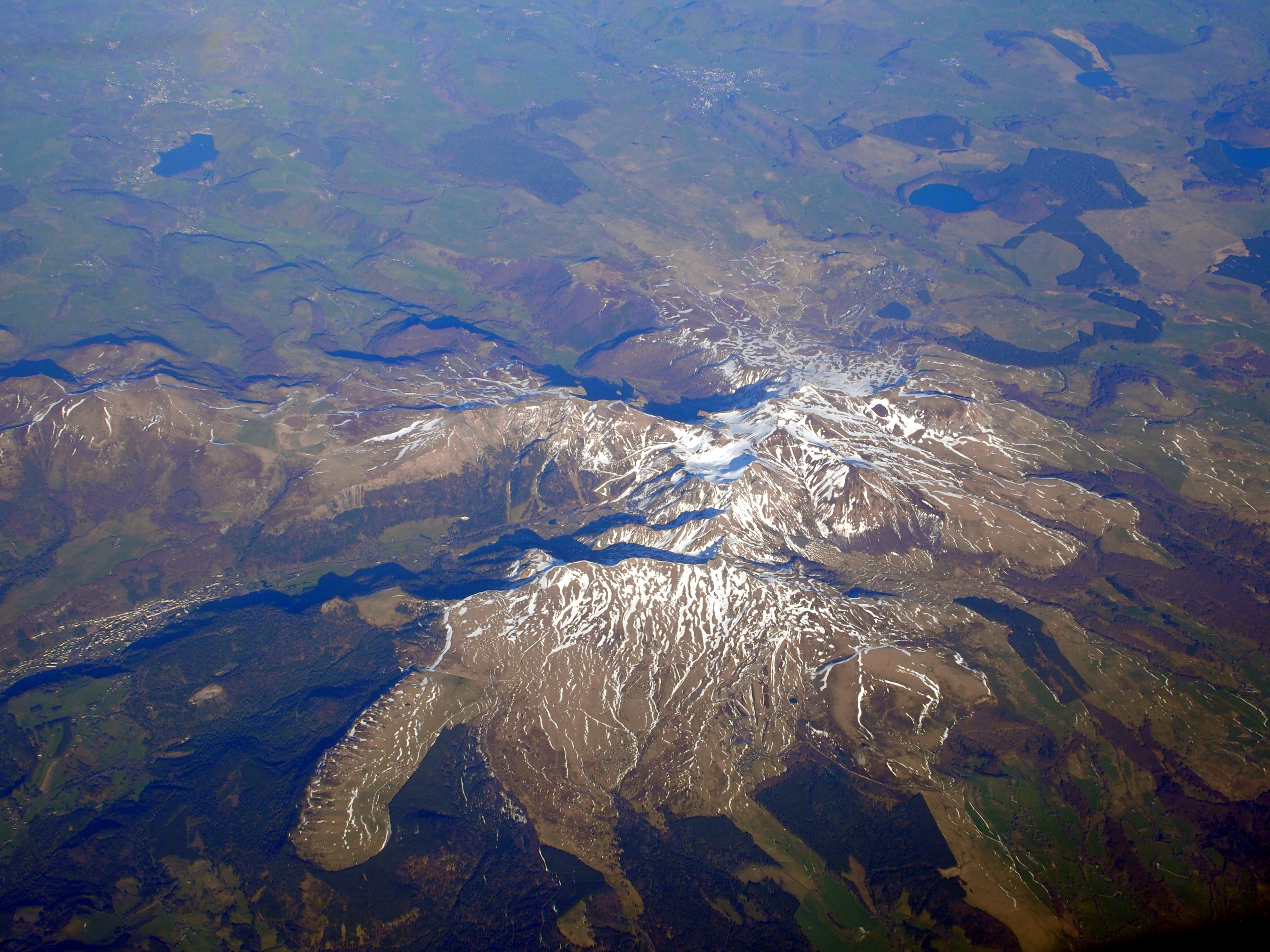 Vue aérienne des monts Dore et du Puy de Sancy. Au fond de la gauche vers la droite les lacs Chambon et Pavin (2016)